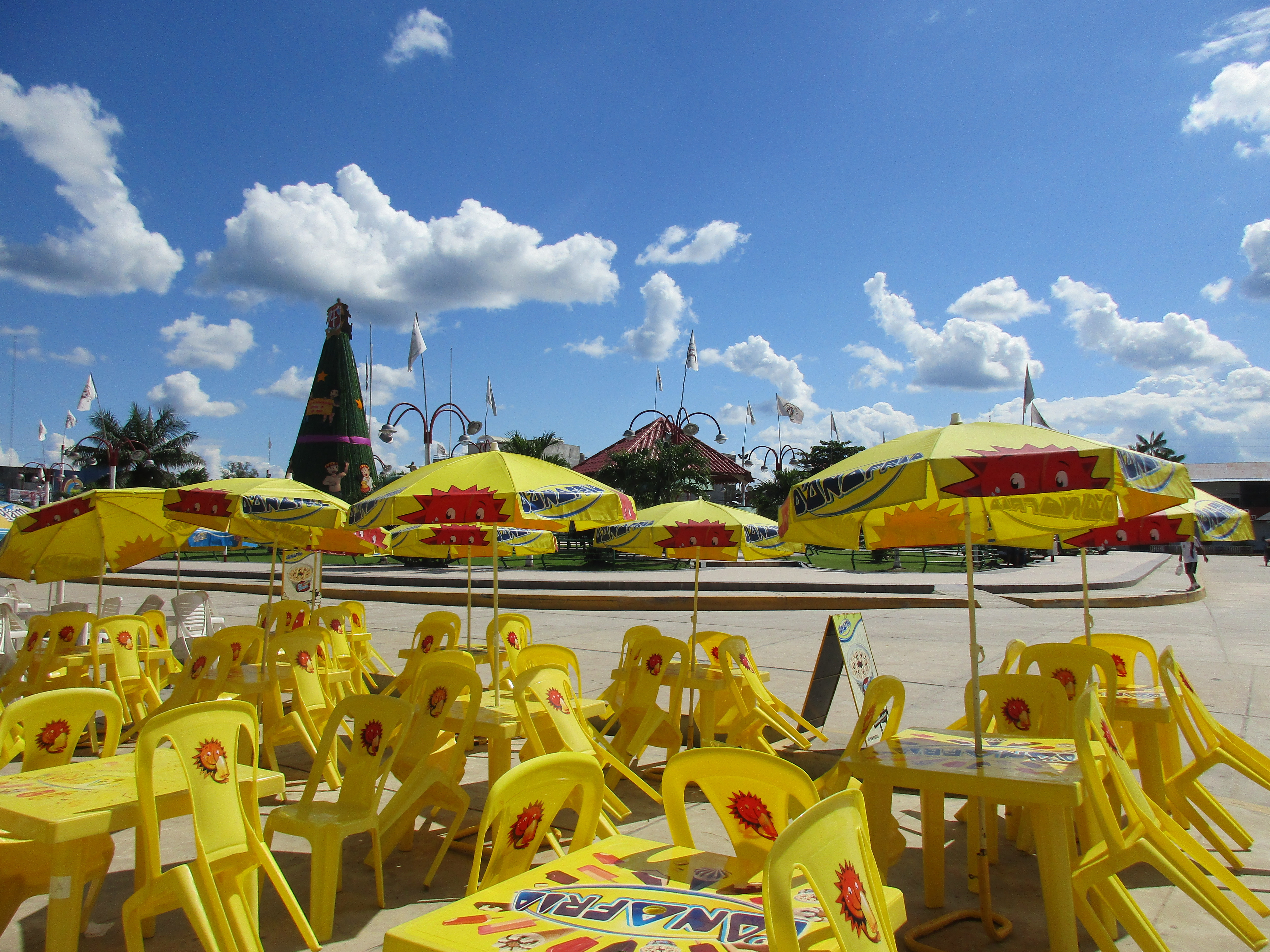 Plaza Jose Abelardo Quiñones Iquitos